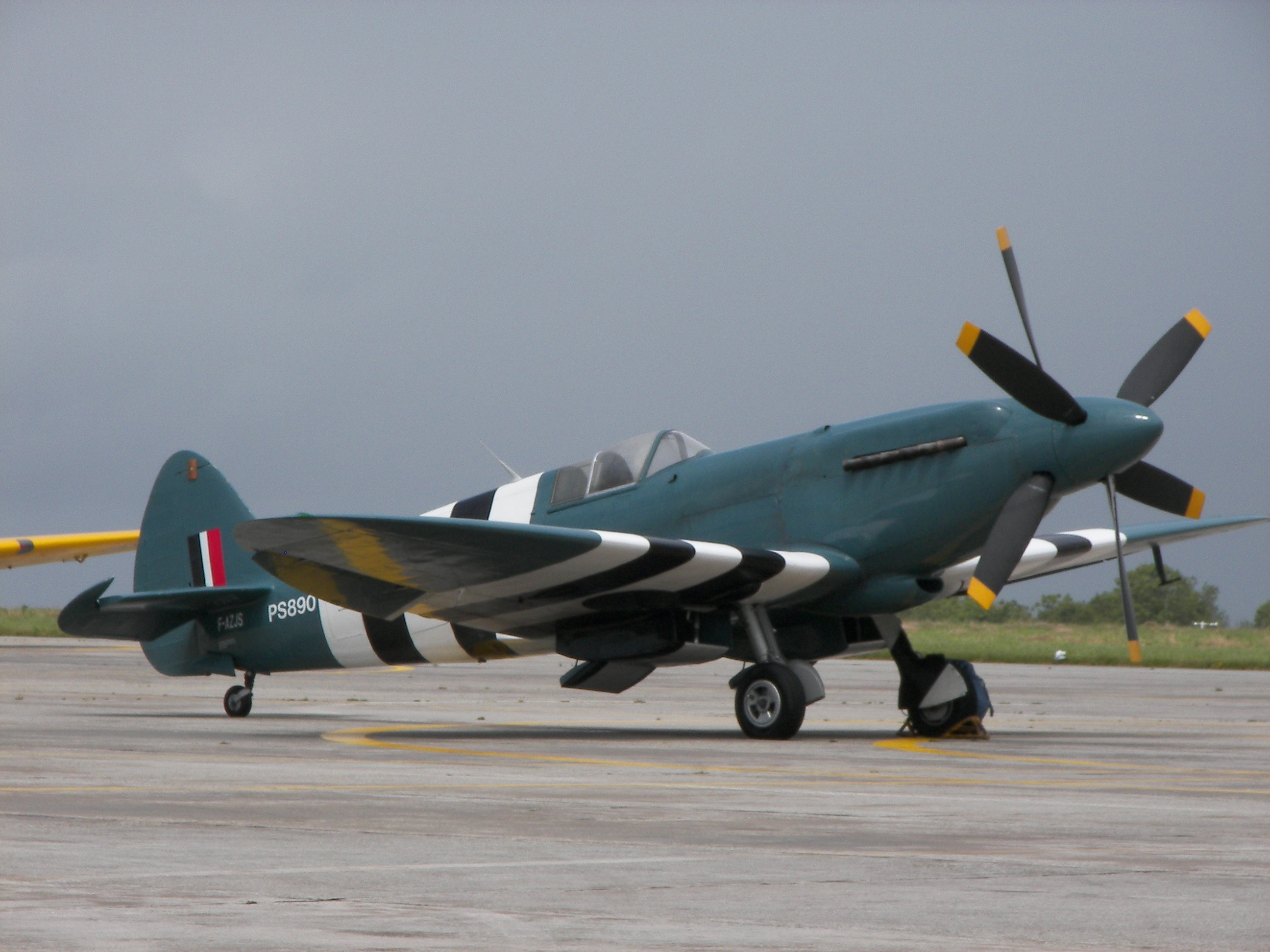 supermarine spitfire PR 19 de C. Jacquard